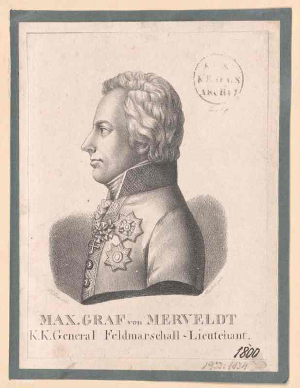 Maximilian Friedrich von Merveldt (* 29. Juni 1764; † 5. Juli 1815), deutscher Militär und Diplomat